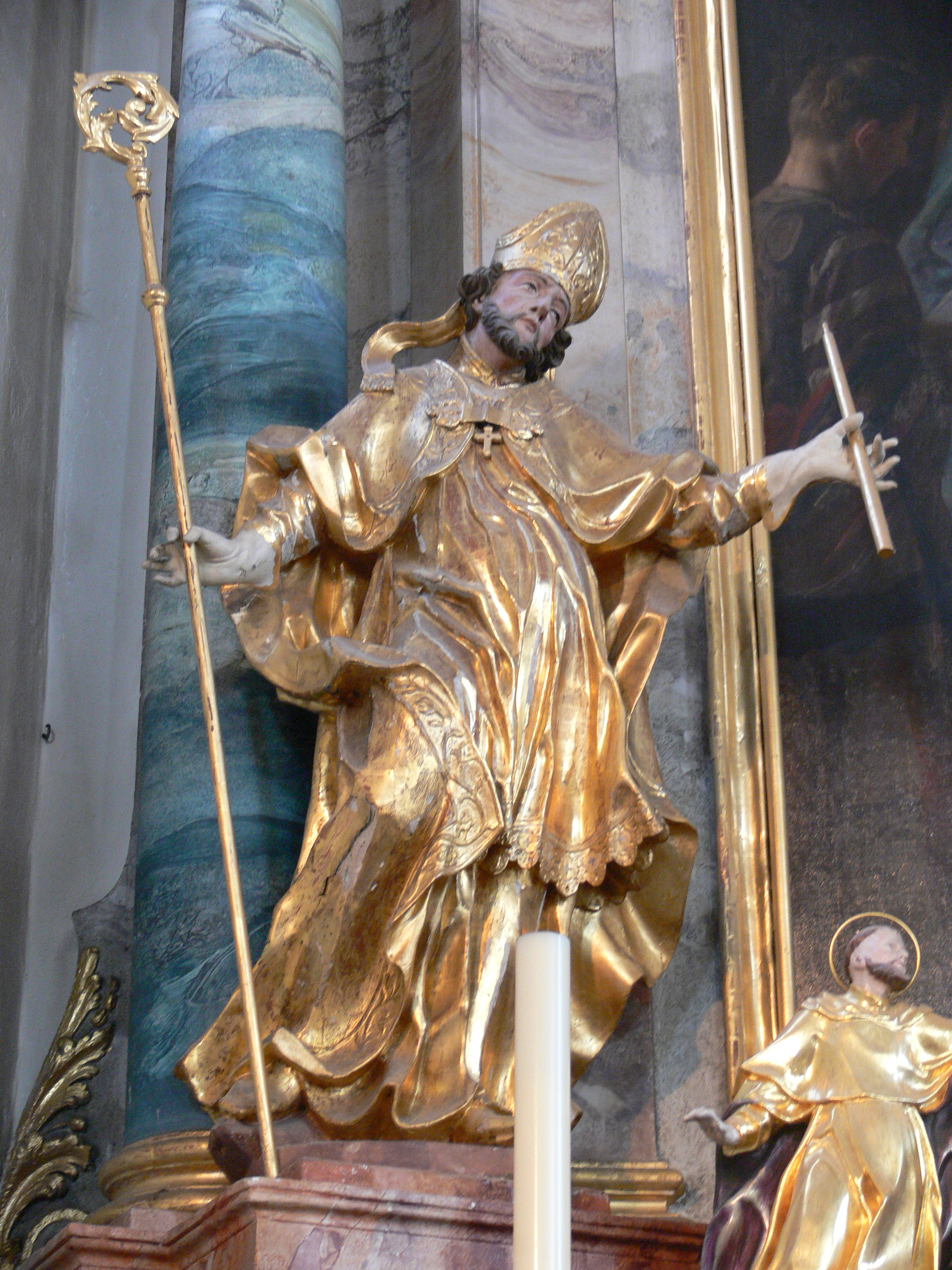 Ehemalige Klosterkirche (heute Katholische Pfarr- und Wallfahrtskirche) Mariä Himmelfahrt, St. Märgen im Schwarzwald Rosenkranzaltar (Altarrekonstruktion von Hans Weißburger und Ludwig Kubanek, 1909-1910, nach dem ursprünglichen Altar von Johann Martin Hermann aus Villingen): links: Hl. Blasius, von Matthias Faller, 1742/1743